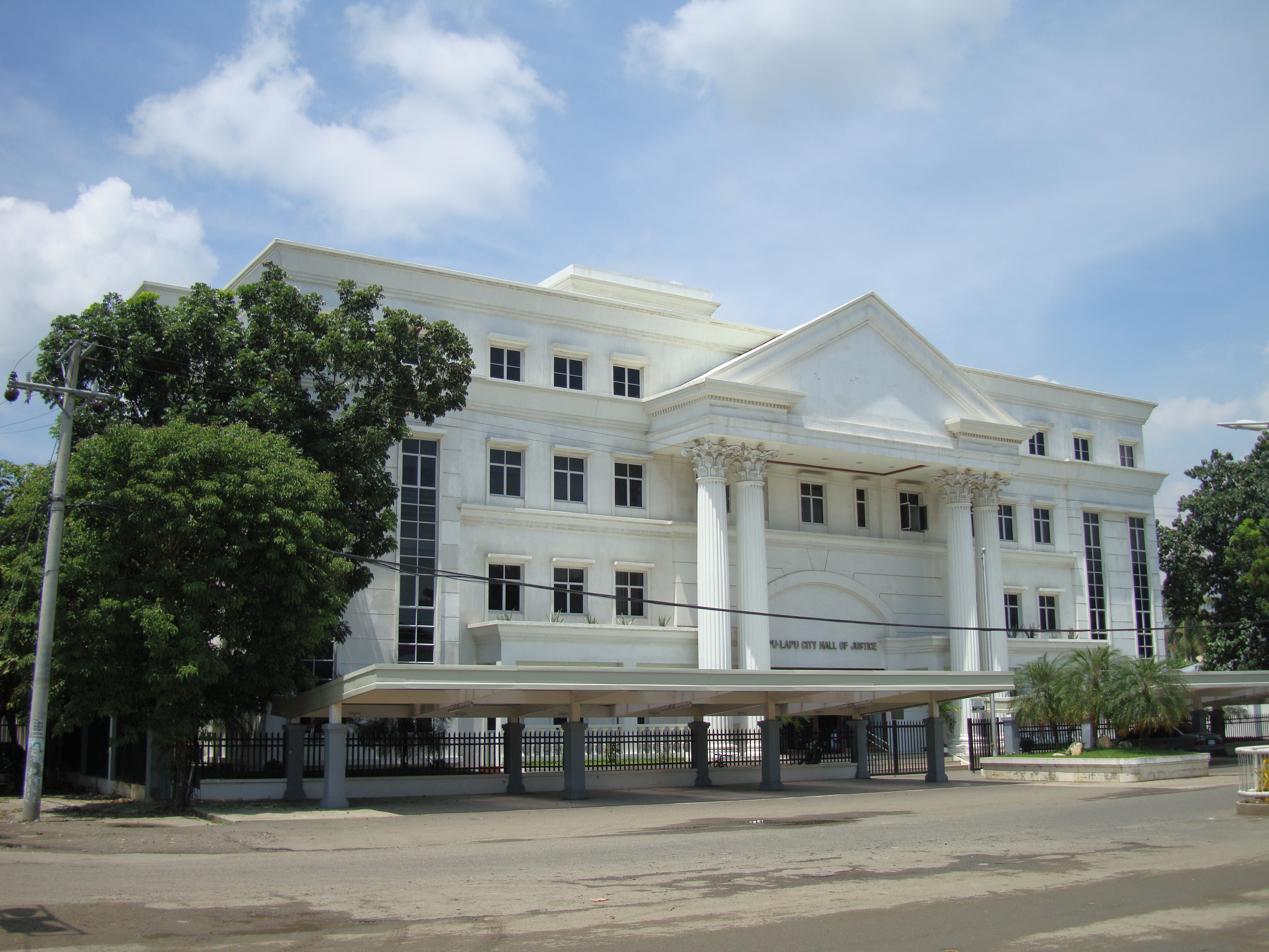 LAPU-LAPU CITY HALL OF JUSTICE